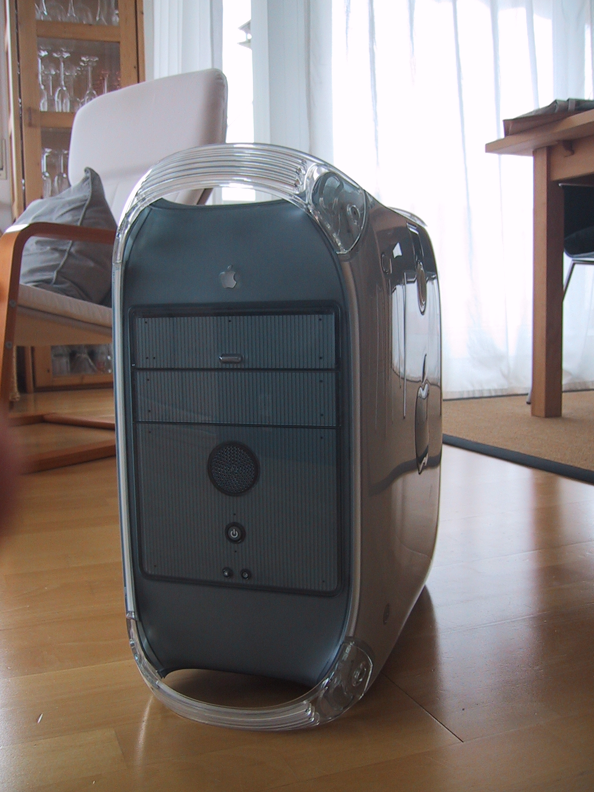 Apple G4 400 Mhz